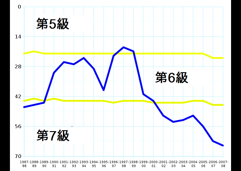 Graph showing Leek Town F.C.'s league finishing positions since 1987. Created by myself Contents 1 Licensing 2 Source 3 Licensing 4 Original upload log 4.1 File usage on other wikis Licensing Source By ChrisTheDude, the uploader.